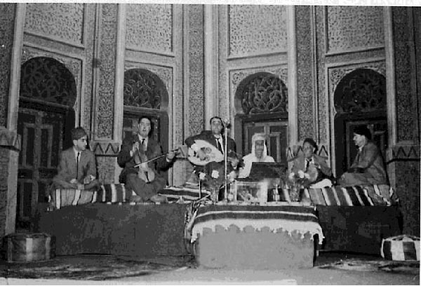 GAUCHE À DROITE : ABDELHAMID BENKARTOUSSA A LA FLUTE , SYLVAIN GHRENASSIA AU VIOLON , RAYMOND LEYRIS A L'OUD , BELAMRRI LARBI (TURBAN) AU TAMBOURIN, NATHAN BANTARI A LA DERBOUKA , HAIM BENBALA AU TAR